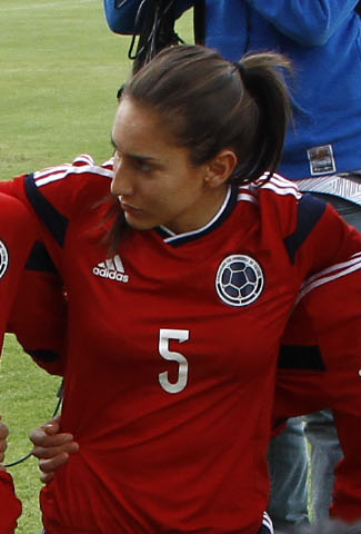 Quito, 28 sep (Andes).- La selección brasileña femenina de fútbol se proclamó Campeona de la Copa América de Fútbol Ecuador 2014. En la gráfica la selección de Colombia. Foto: Micaela Ayala V./Andes